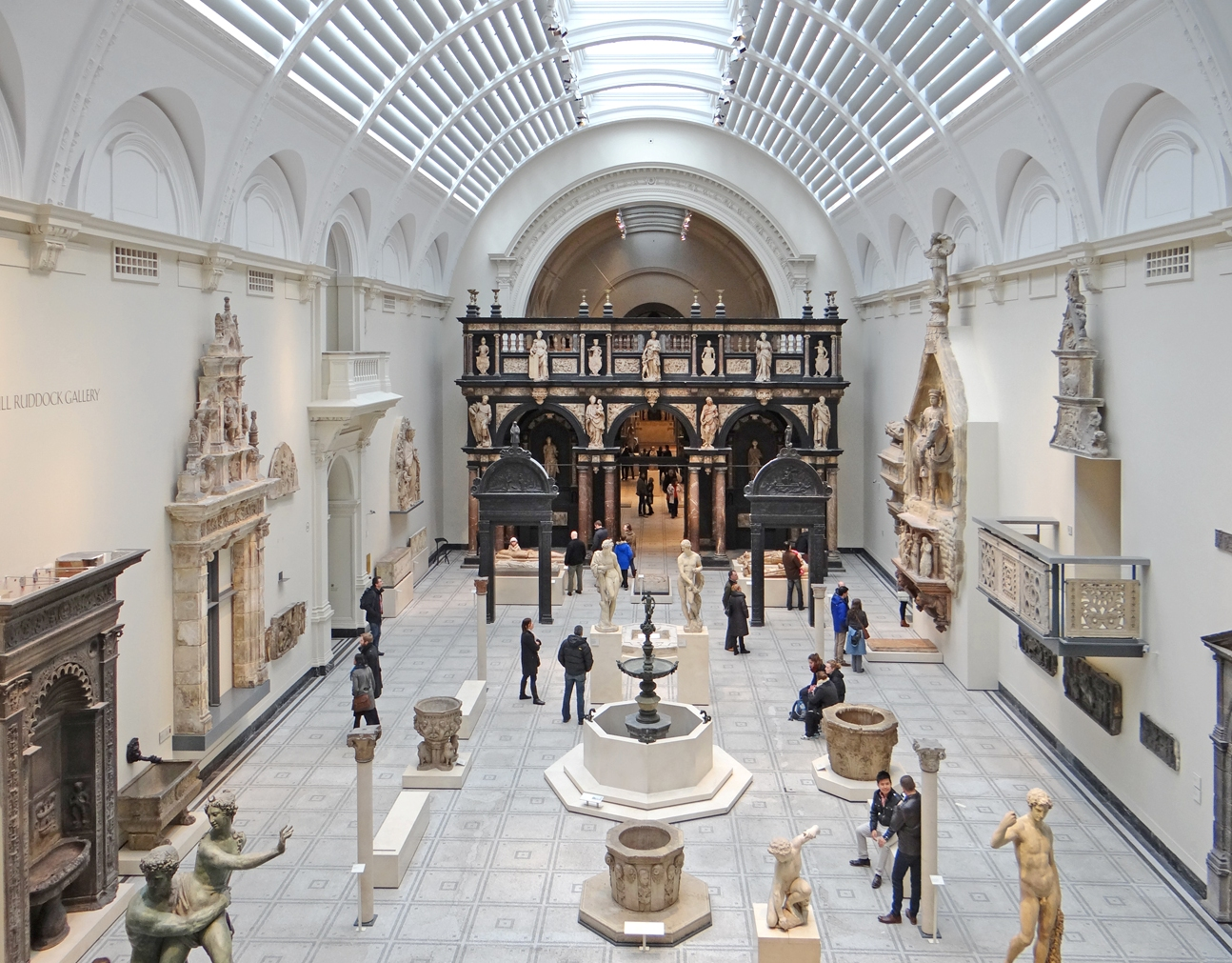 La galerie Paul and Jill Ruddock consacrée à la Renaissance 1350–1600 Site du Victoria and Albert Museum (V&A Museum, Londres)